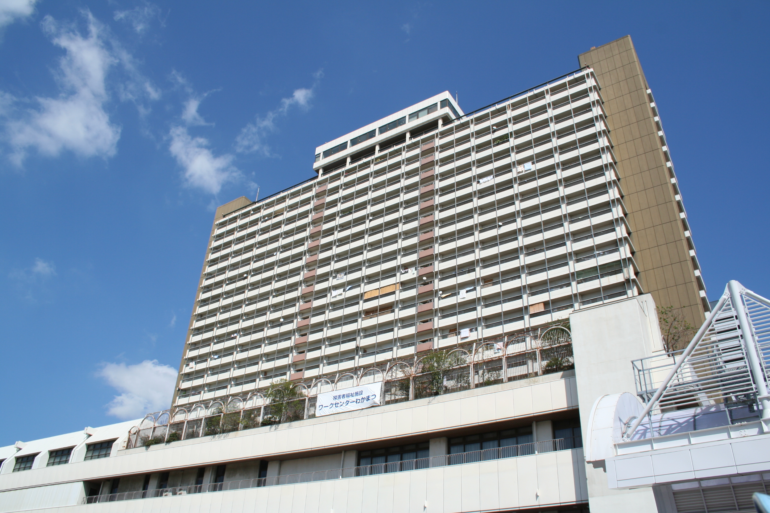 2009年10月4日、兵庫県神戸市長田区若松公園にて開催された鉄人28号完成記念式典。 東側に建つ大丸と高層マンション。